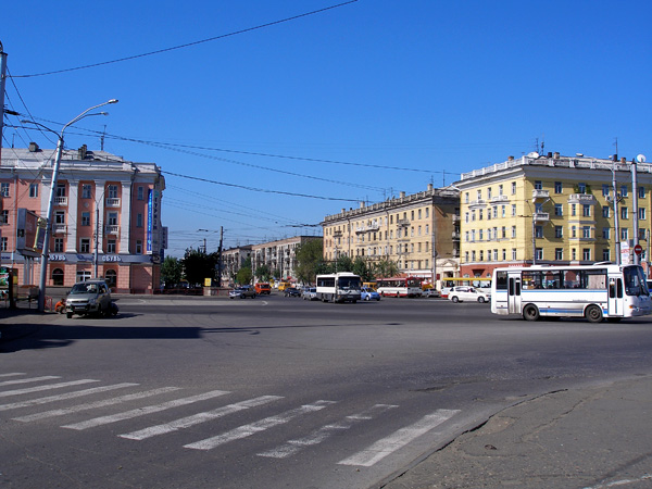 Пл. Октября. Барнаул